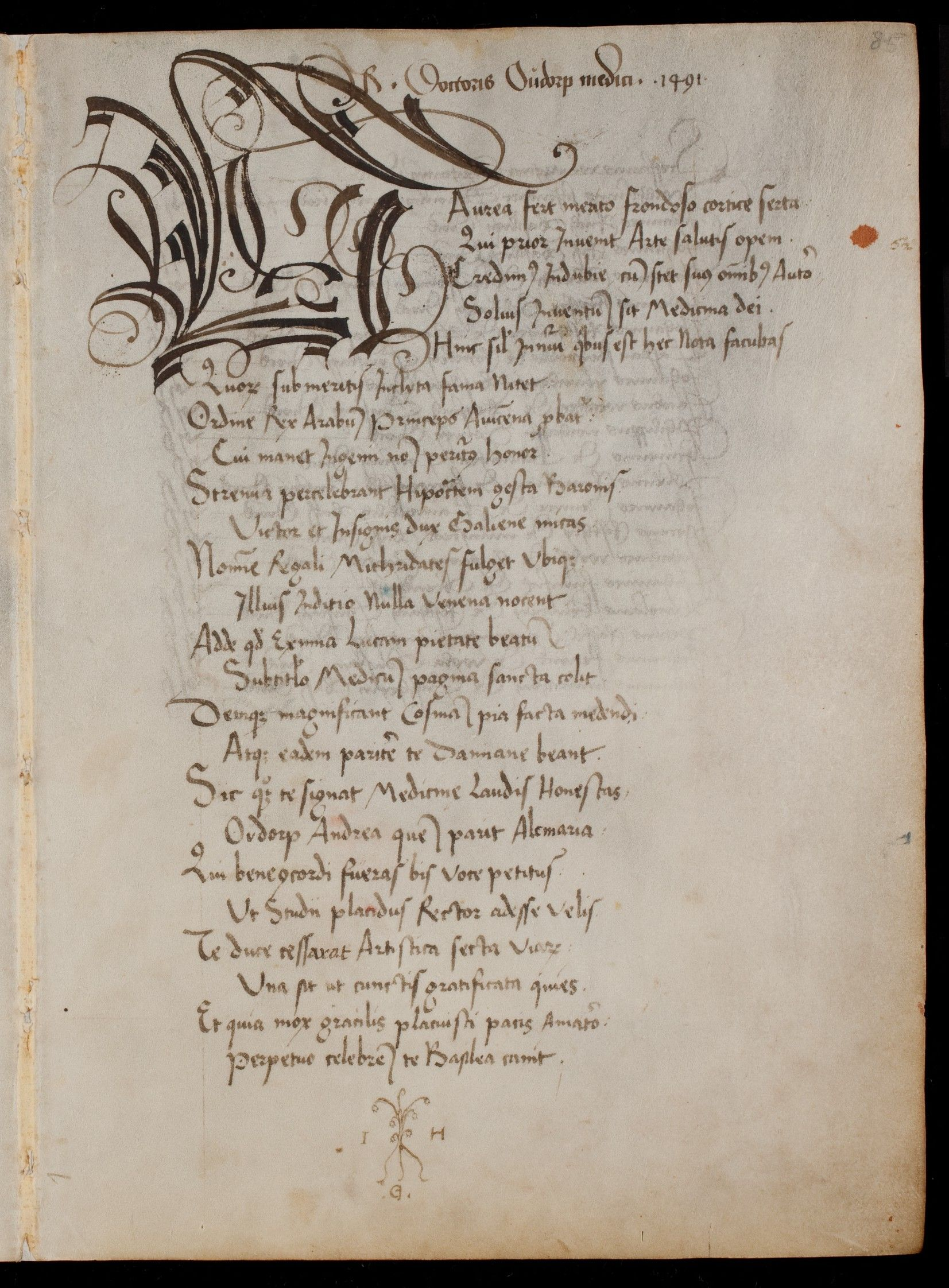 Eigenhändiger Eintrag des Humanisten Johannes Heberling (I. H. G. = Iohannes Heberling Gamundianus) in der Matrikel der Universität Basel 1491